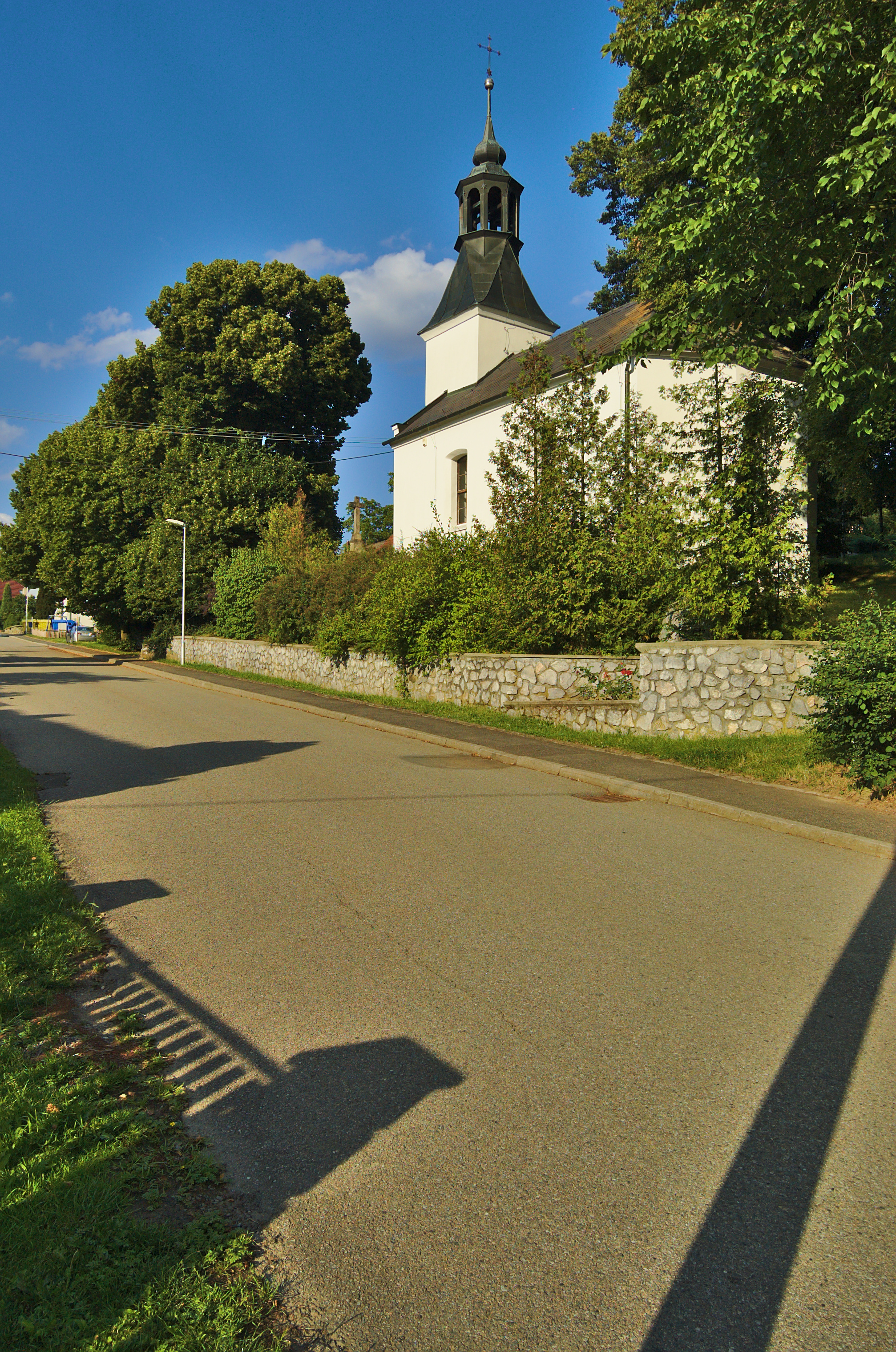 Kaple svatého Floriána - zadní pohled, Seč, Lipová, okres Prostějov